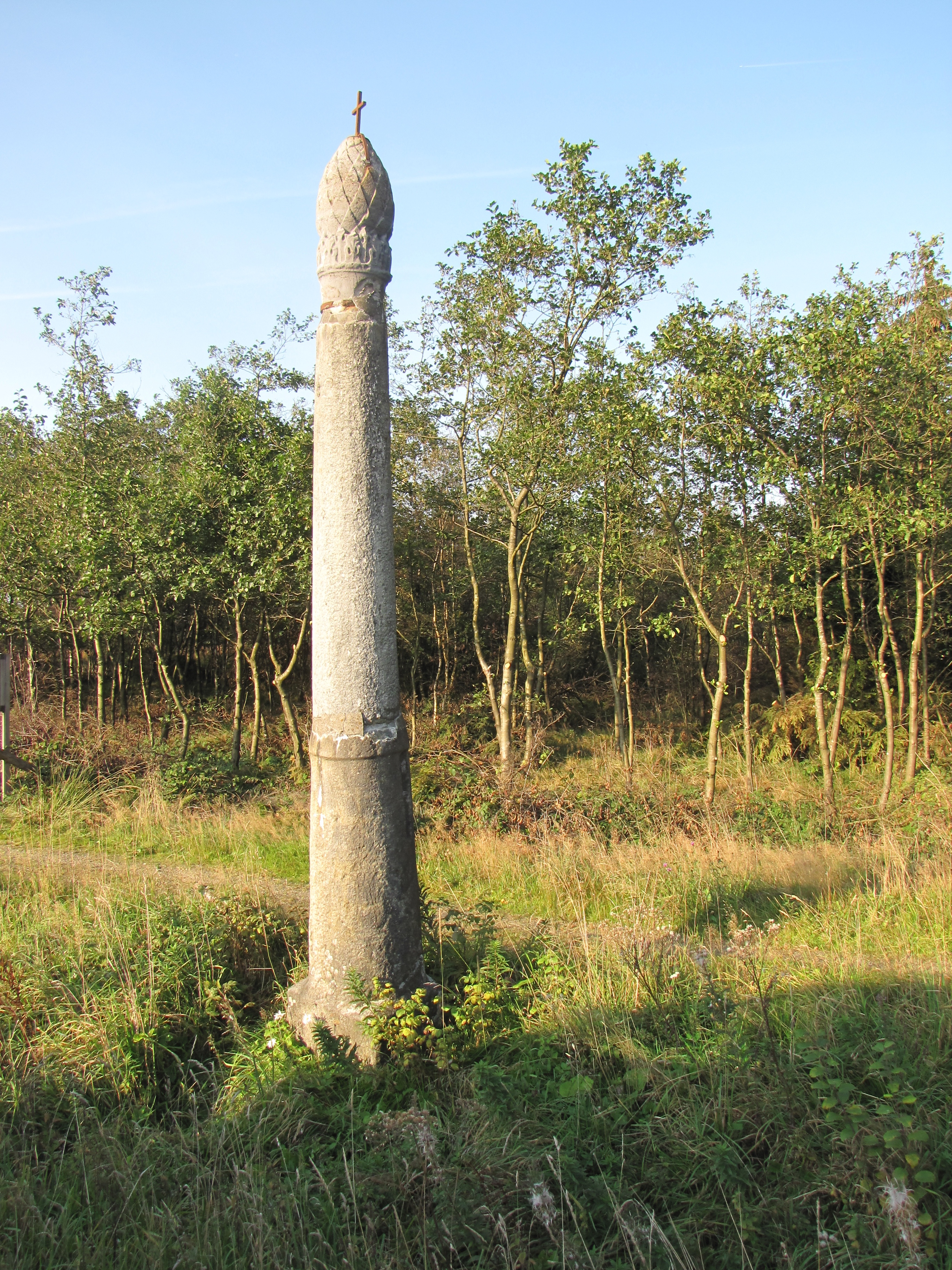 Erigé en 1566 en même temps que les colonnes Panhaus et Hauptmann afin de servir de point de repère à travers la fagne. Le Boultè est situé à la Baraque Michel. Il est l’emblème de la Société Royale « Les Amis de la Fagne ».